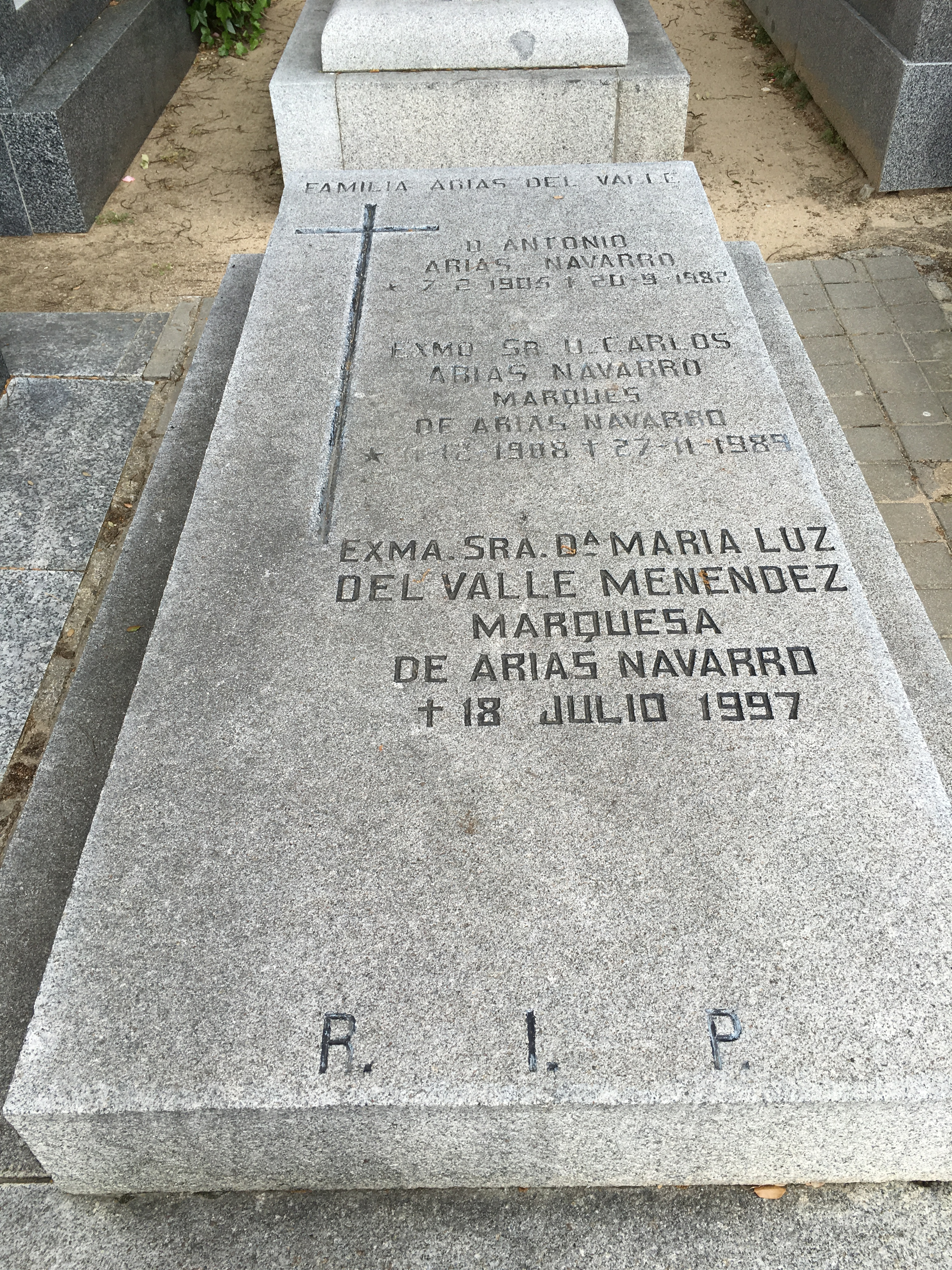 Lugar de enterramiento de Don Carlos Arias Navarro y su esposa Doña Luz del Valle en el cementerio del Pardo